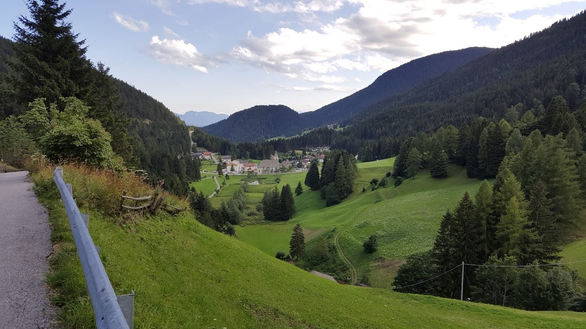 Vista da Obkirchhof